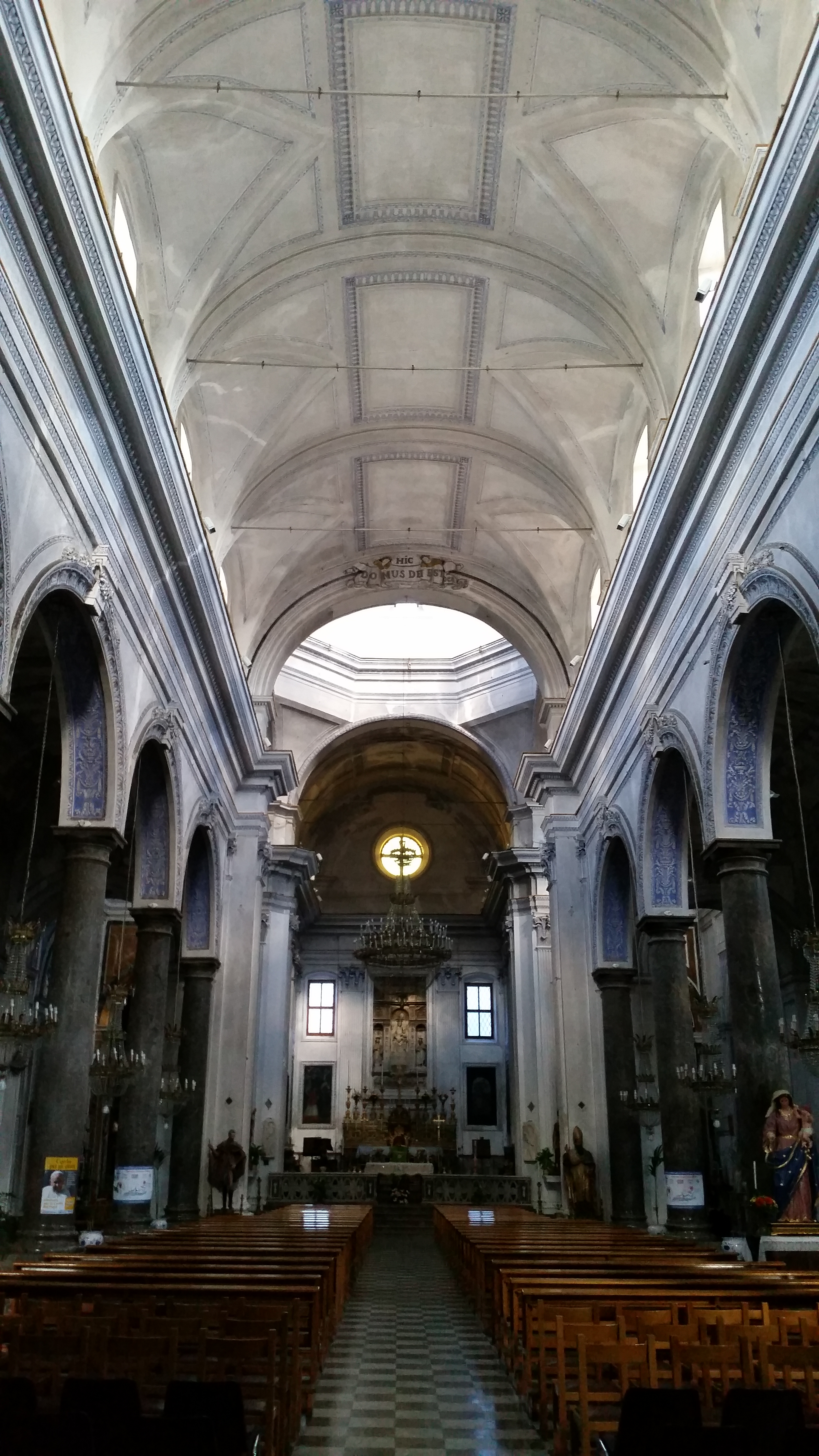 Petralia Sottana church